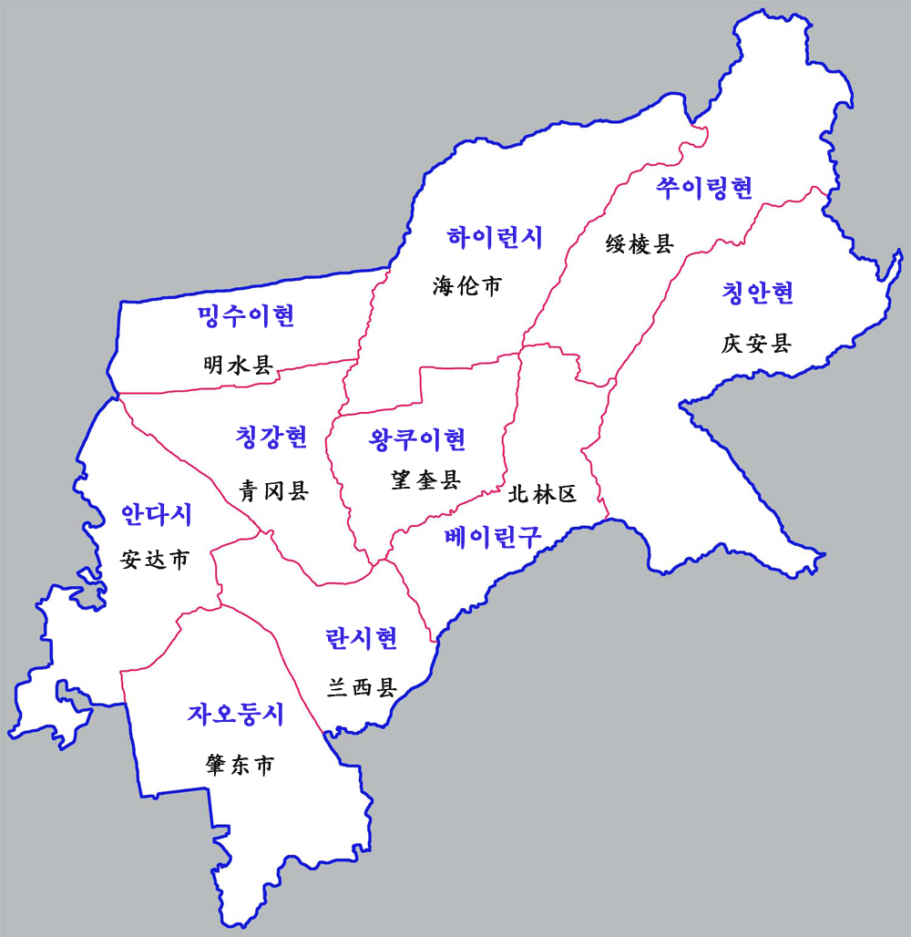 쑤이화시 현급구역